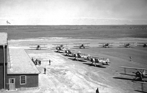 De Winton vliegschool